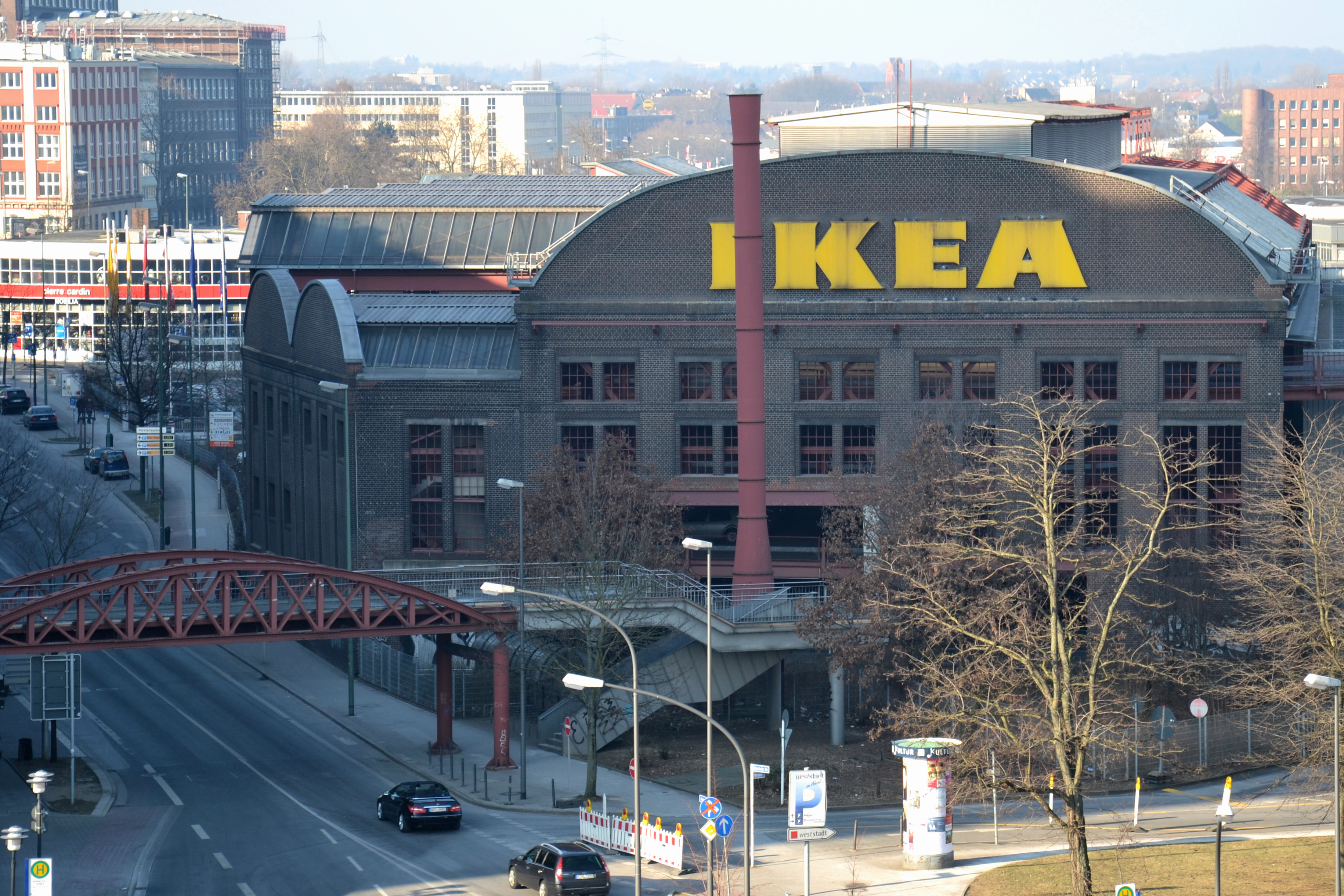 Ehem. Press- und Hammerwerk der Fa. Krupp in Essen